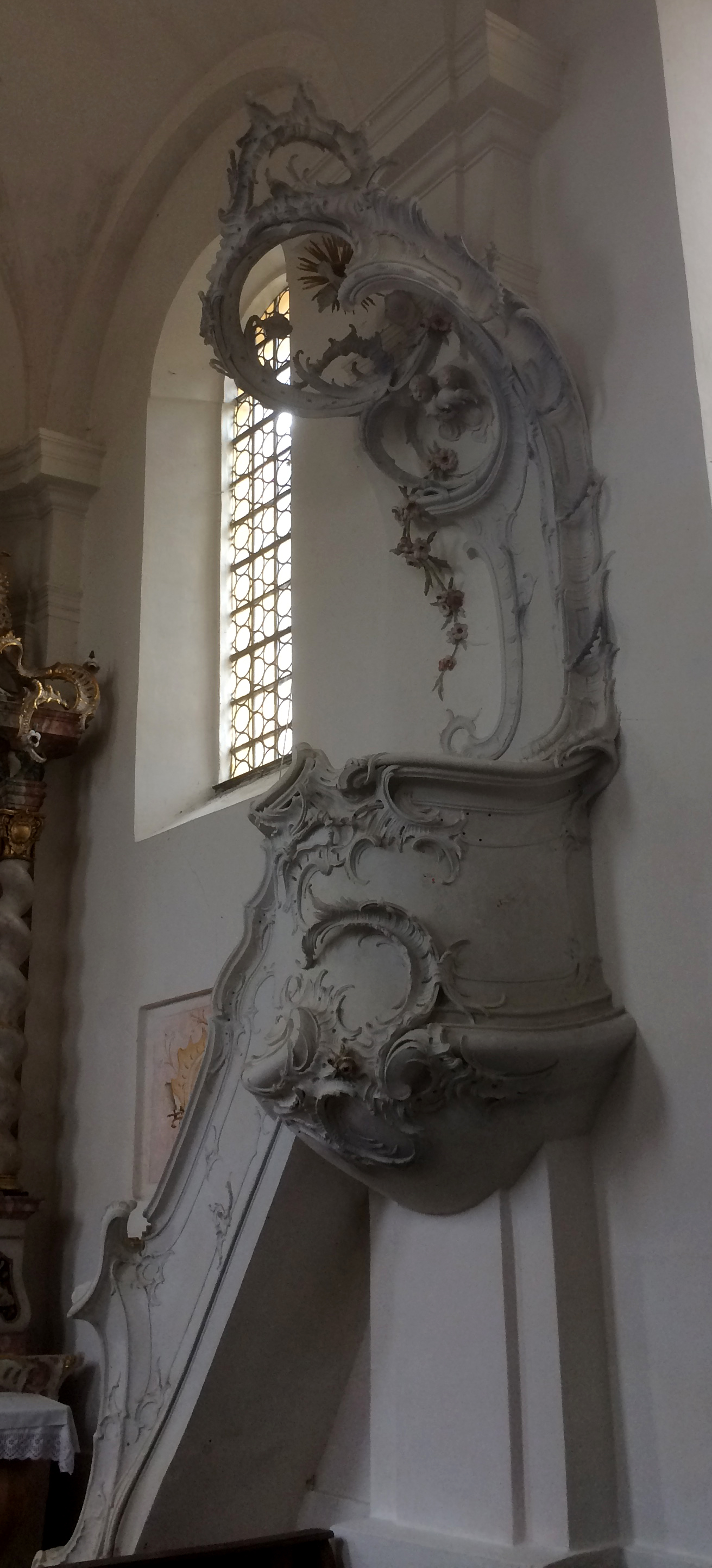 Rokoko-Kanzel von Johann Anton Pader (1765) in der Filialkirche St. Johannes d.T., Oppolding (Bockhorn)